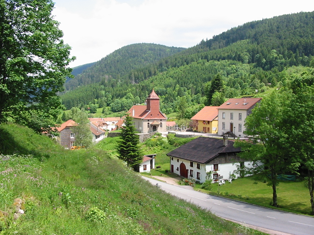 Le Valtin, commune des Vosges. L'église et la mairie.